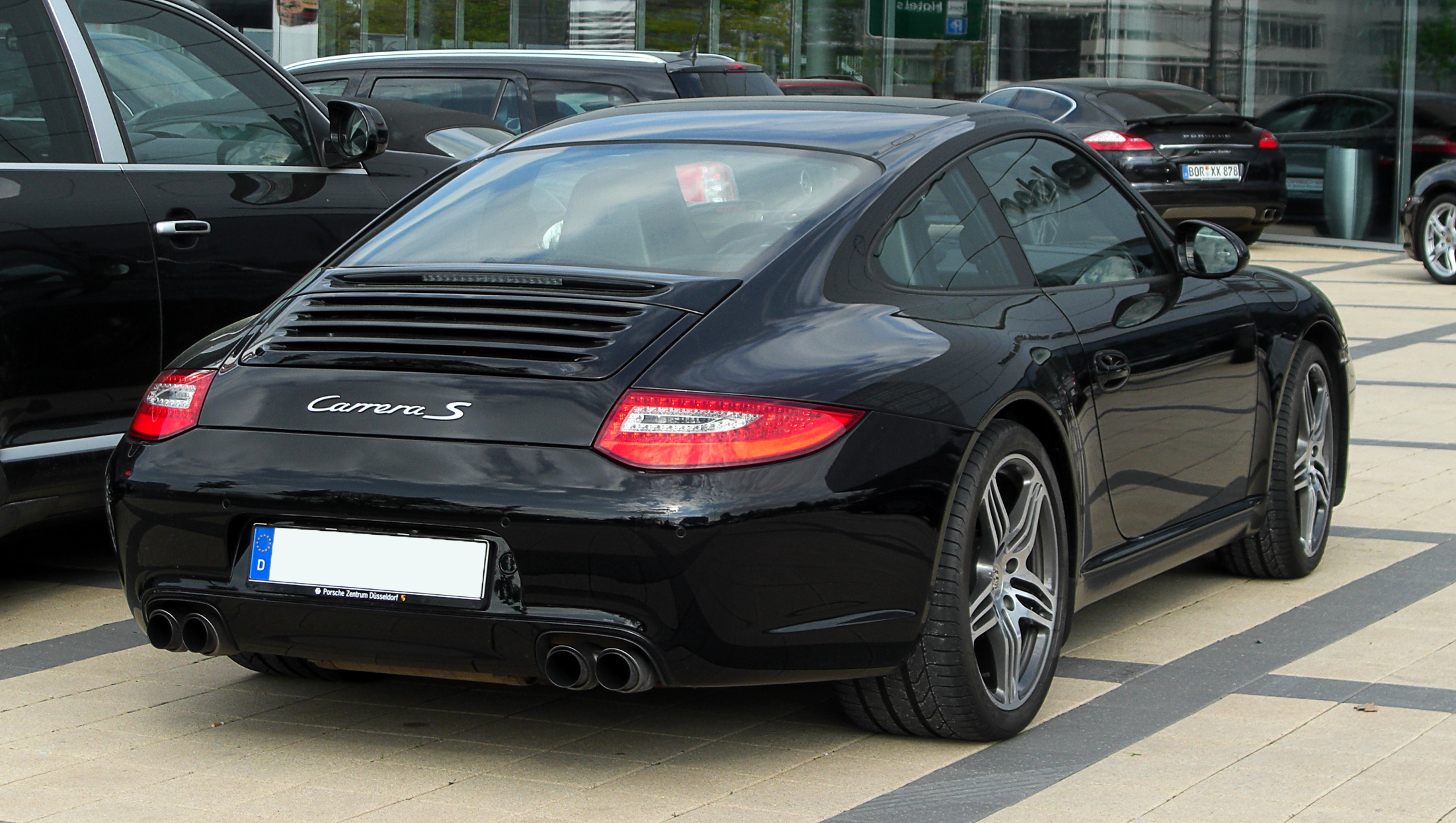 Porsche 911 Carrera S Coupé (997, Facelift)